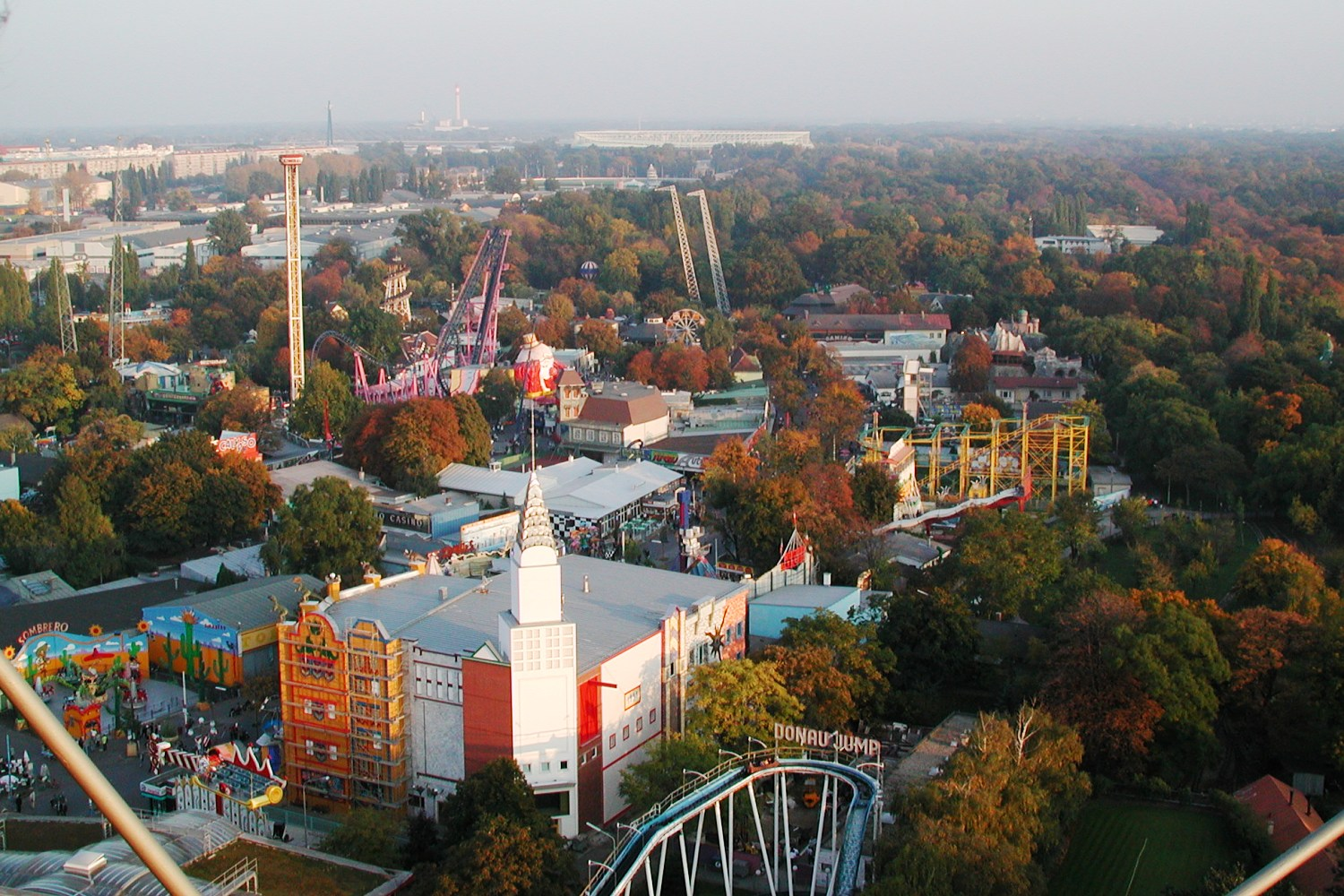 Description: View over the Prater amusement Park in Vienna, picture taken from the Riesenrad - Blick über den Wiener Prater, Aufnahme vom Riesenrad own image, taken October 15, 2000 Photographer: Herbert Ortner, Vienna, Austria